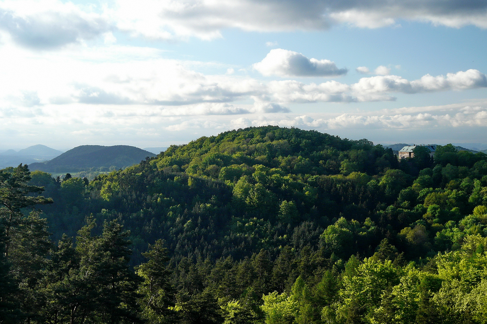 Zámecký vrch a hrad Houska z Drnclíku